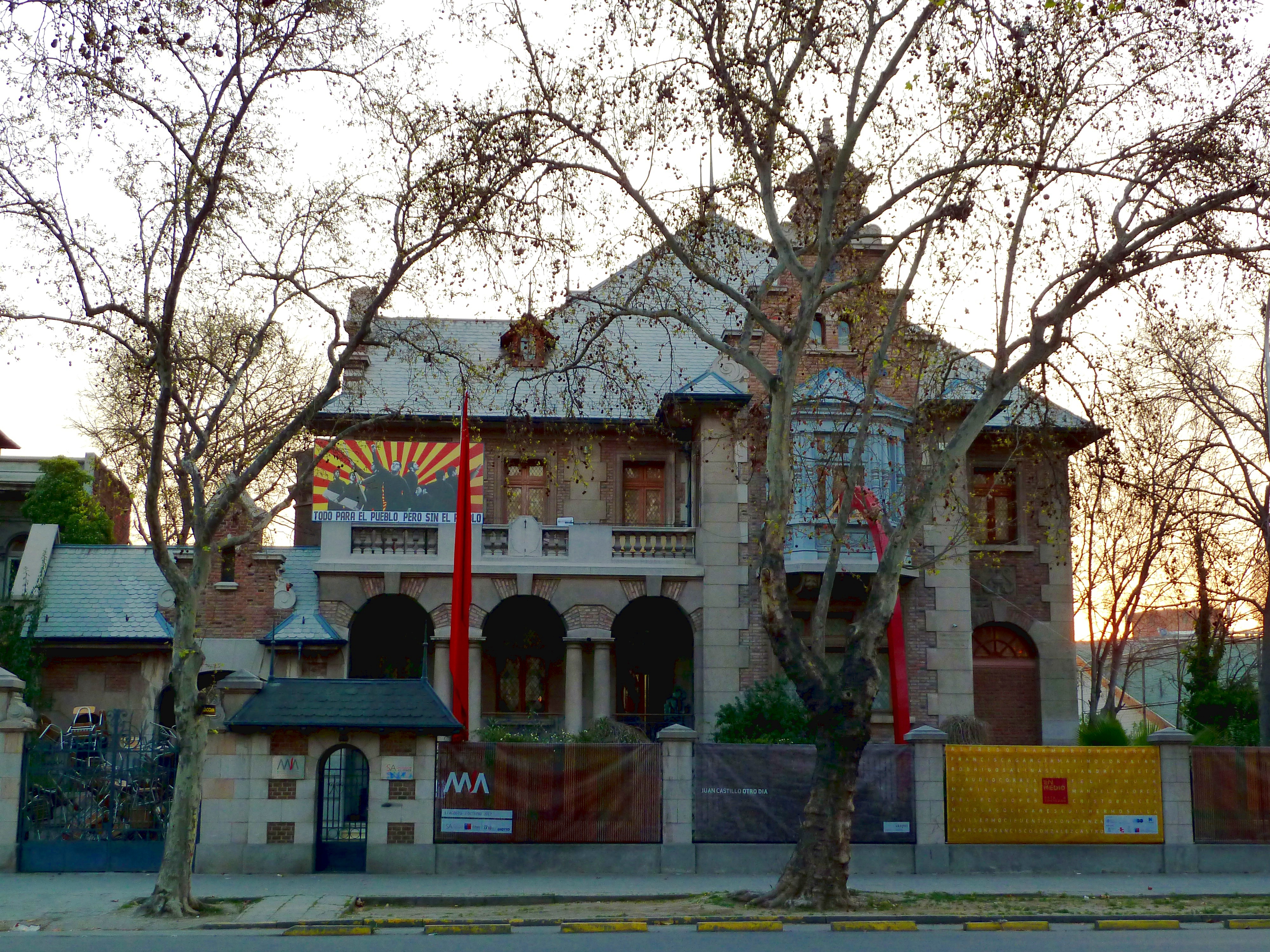 Casonas de Avenida República This is a photo of a national monument in Chile: 415